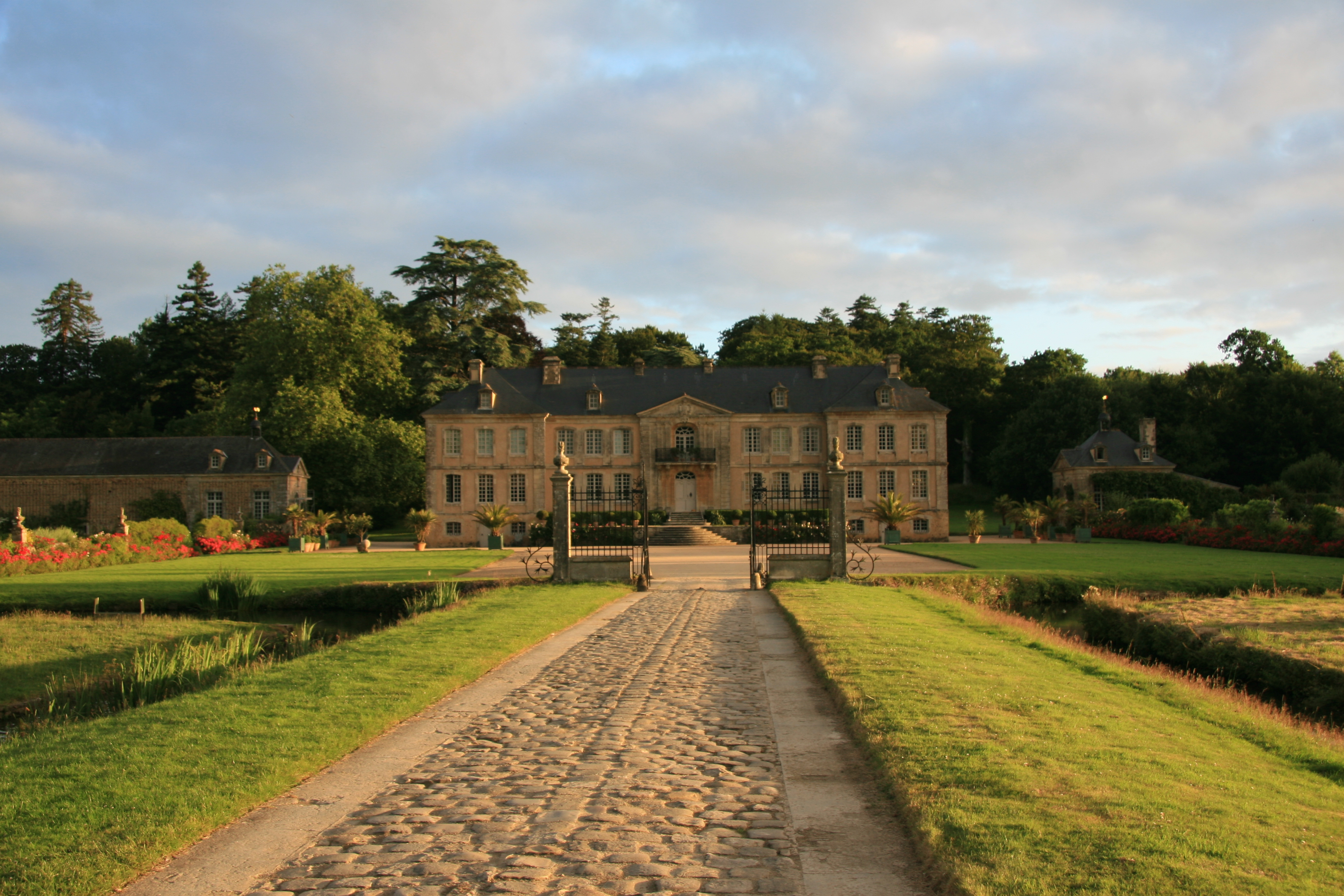 Das Schloss Pont-Rilly, Manche, Basse-Normandie